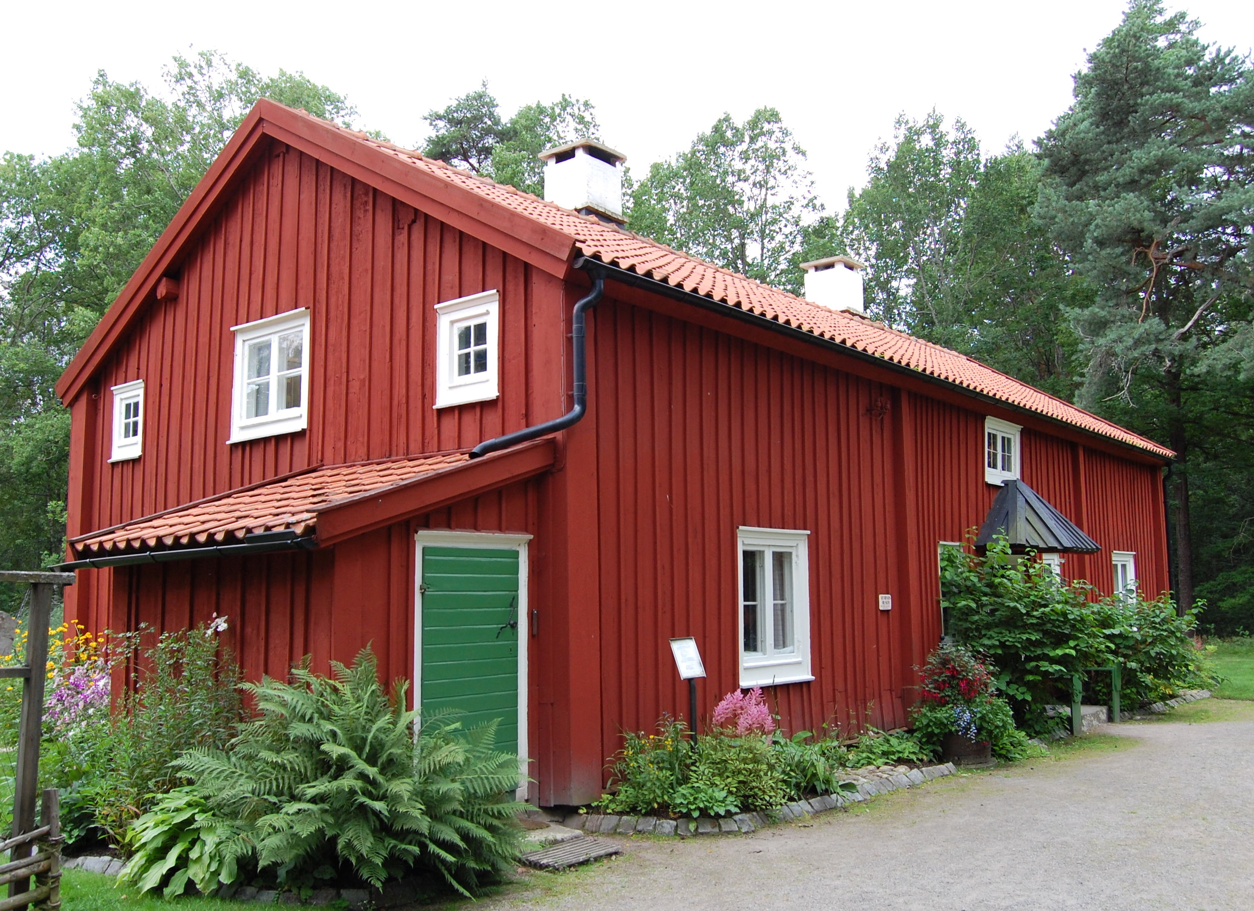 Museum im Park apladalen in Värnamo